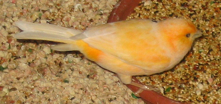 Orange Serinus hybrid